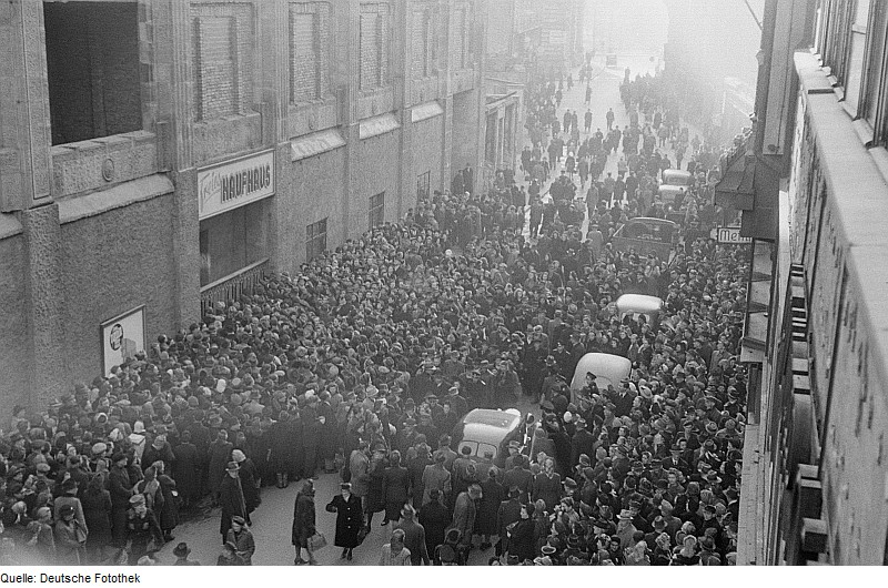 Original image description from the Deutsche FotothekMenschenmenge vor dem Freien Kaufhaus